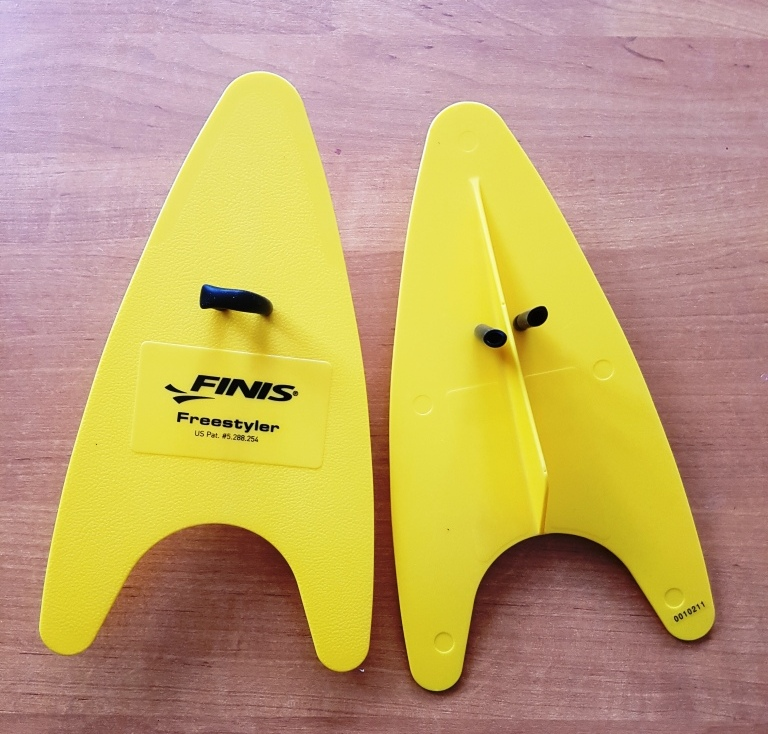 Wiosełka do pływania Schwimm-Paddel Schwimmbrettchen